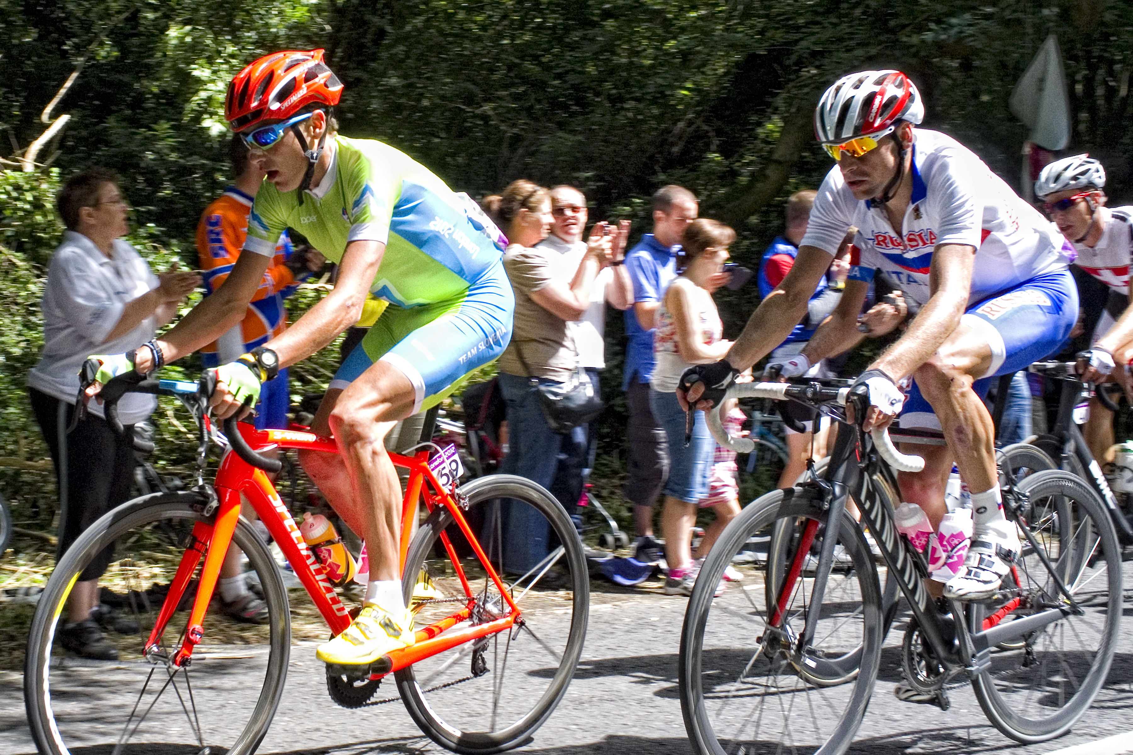 1_S0192854_2